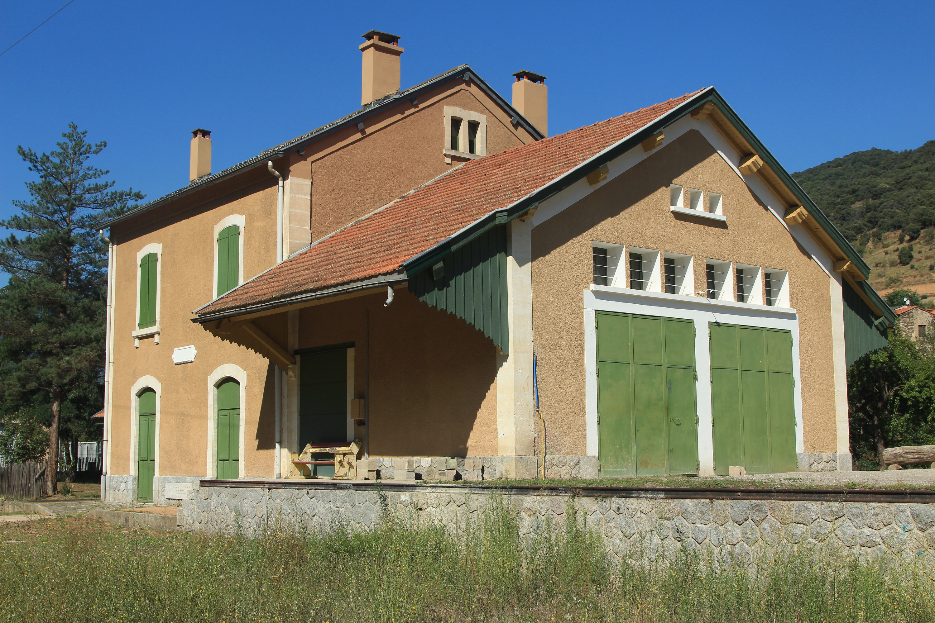 L'ancien bâtiment voyageurs de la gare de Joncet.